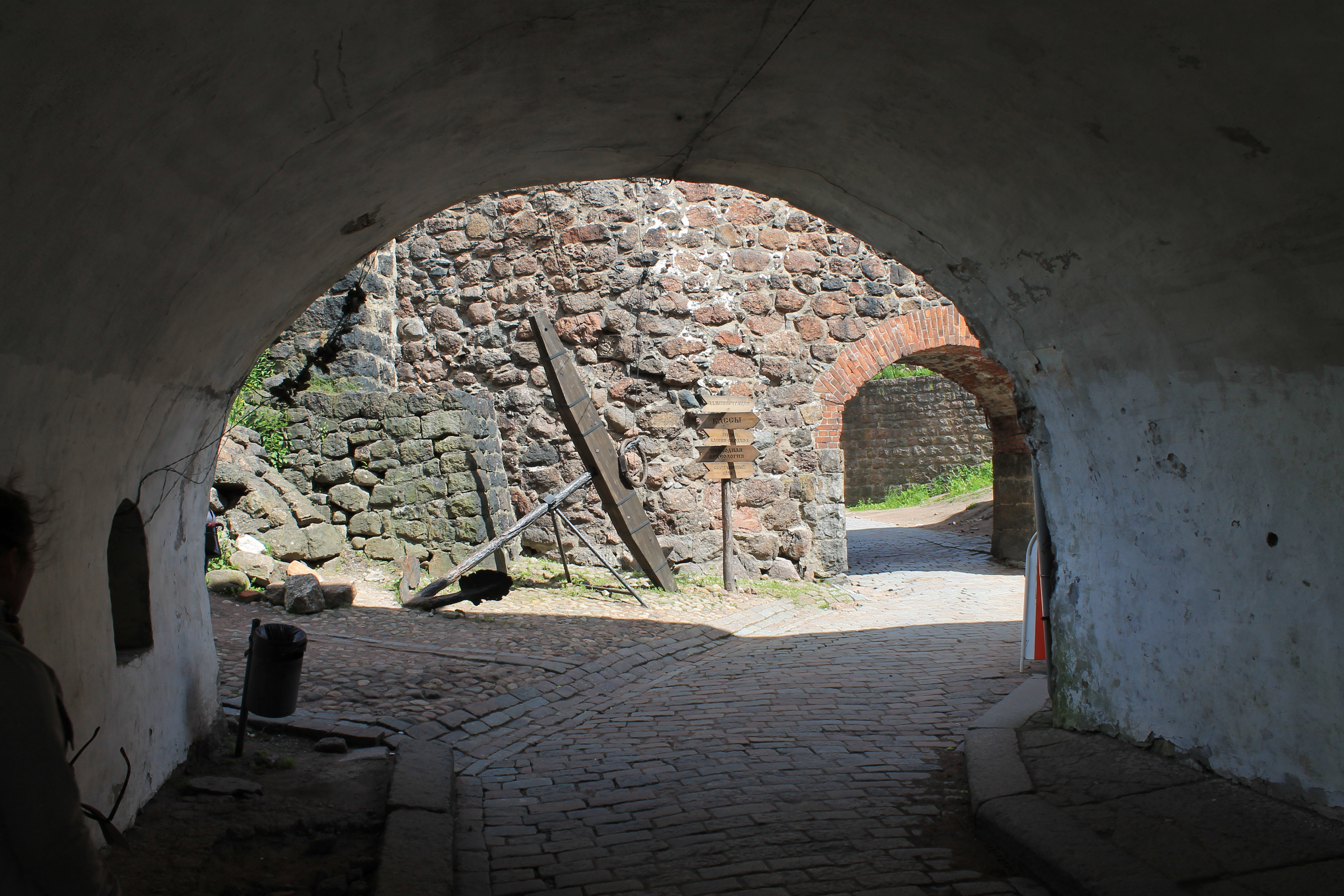 Замок-крепость (комплекс крепостных построек и сооружений на острове) (Санкт-Петербург и Лен.область, Выборг, Выборгская слобода, о. Замковый)